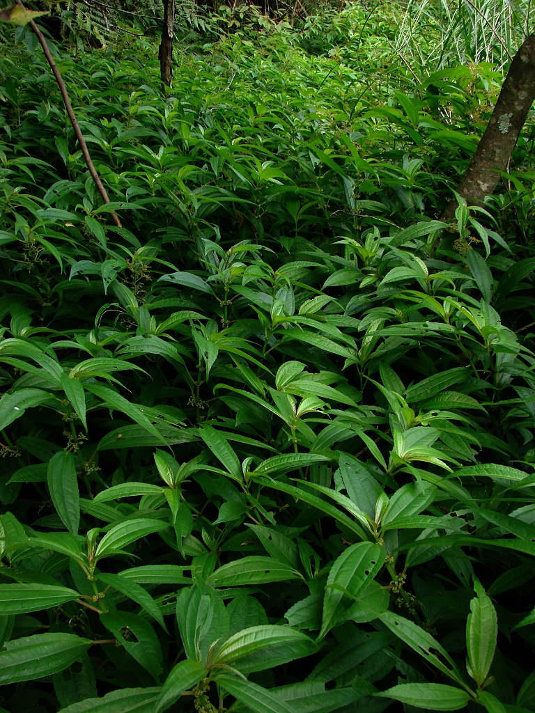 圓果冷水麻in武陵